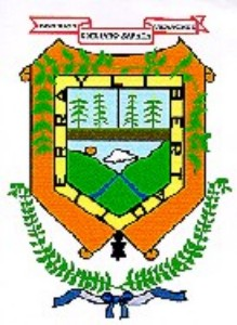 Escudo Emiliano Zapata, Veracruz, México